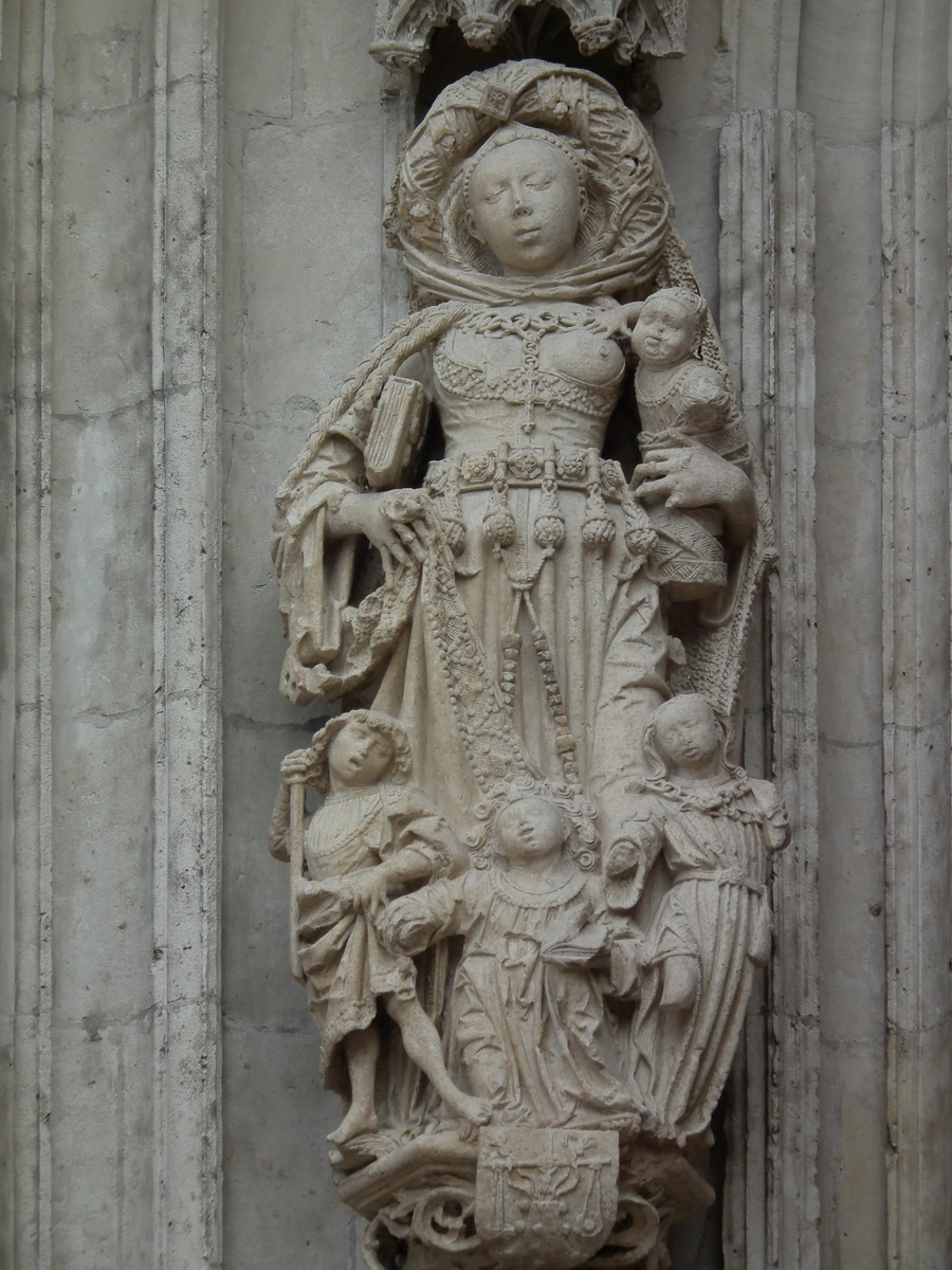 Collégiale Saint-Vulfran, Abbeville, Somme, France